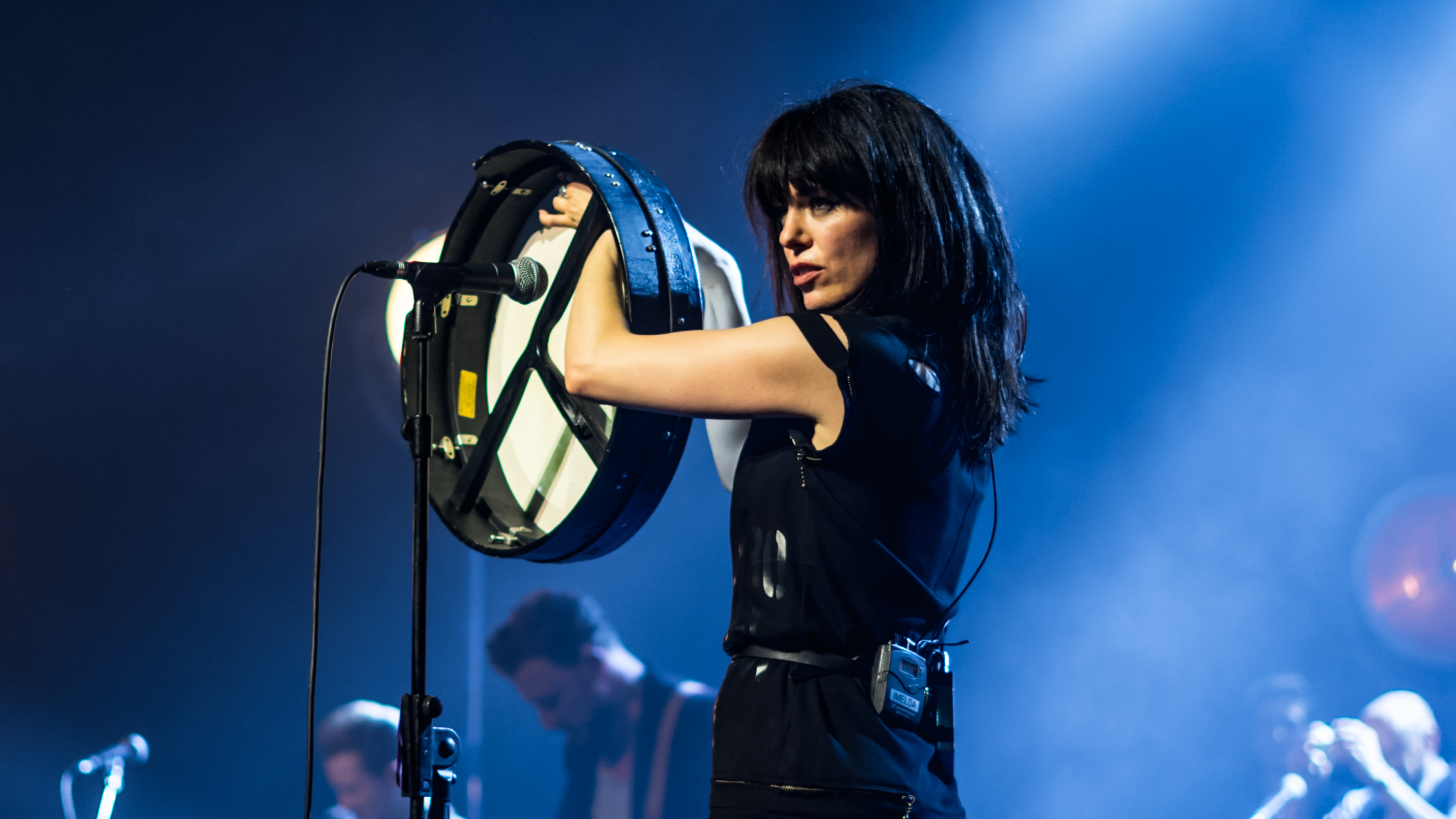 ImeldaMayPalladium180517-18